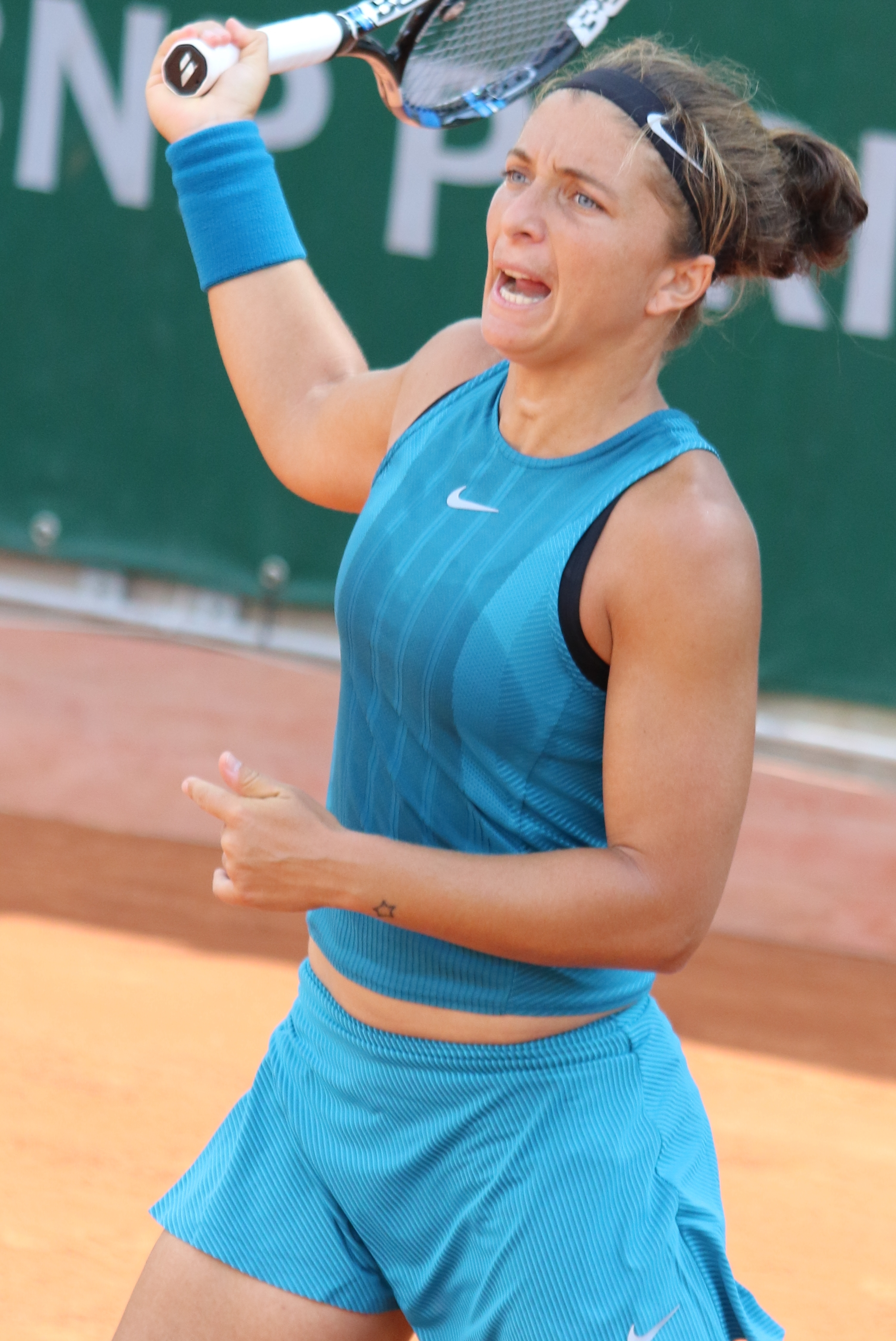 Errani RG18 (15)